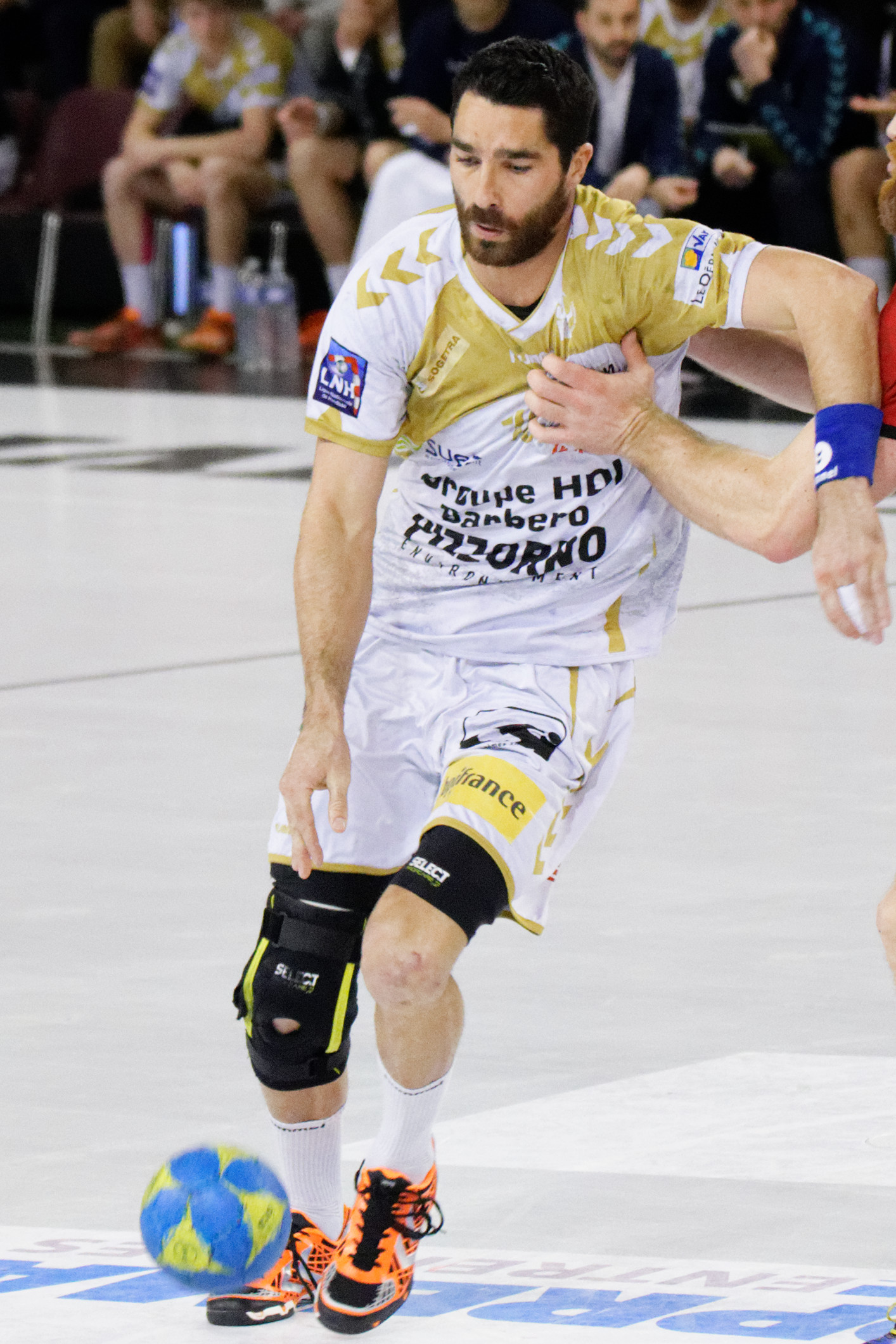 Ivry - Saint-Raphaël lors de la 19e journée du championnat de France de handball masculin le 23 mars 2016 au gymnase Auguste Delaune à Ivry sur Seine.